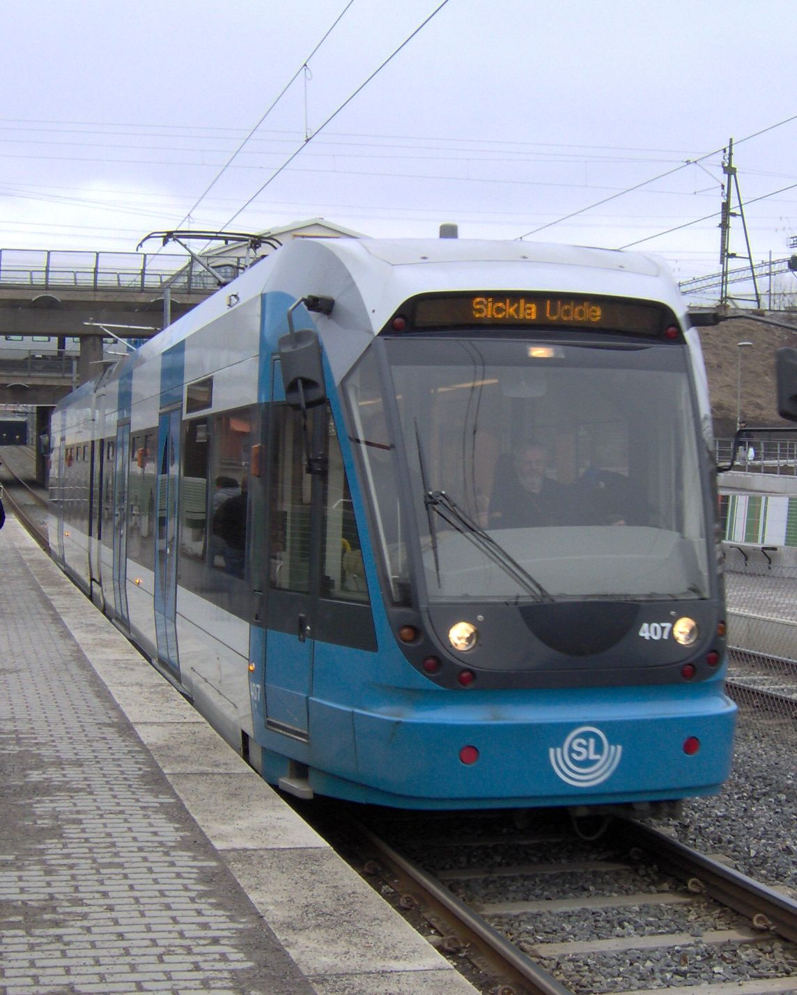 Tvärbanans spårvagn